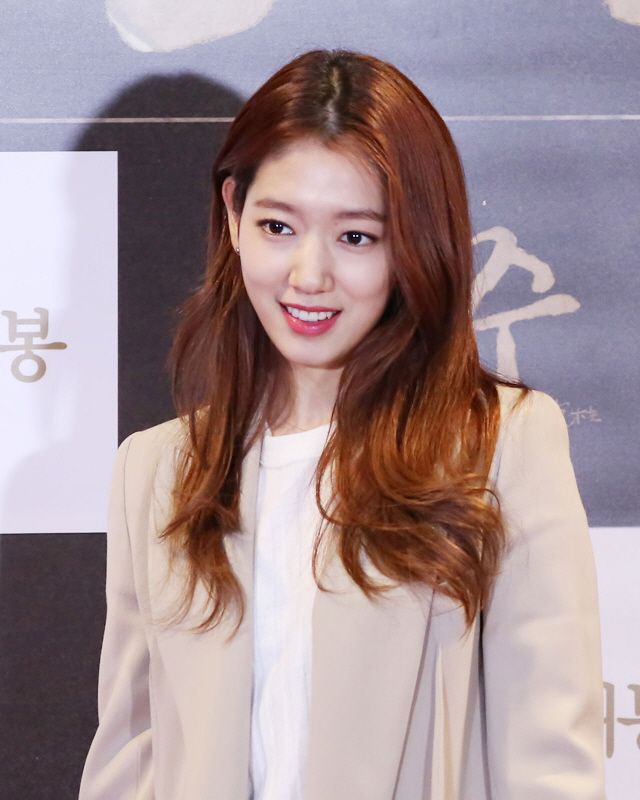 160204 동주 시사회 박신혜